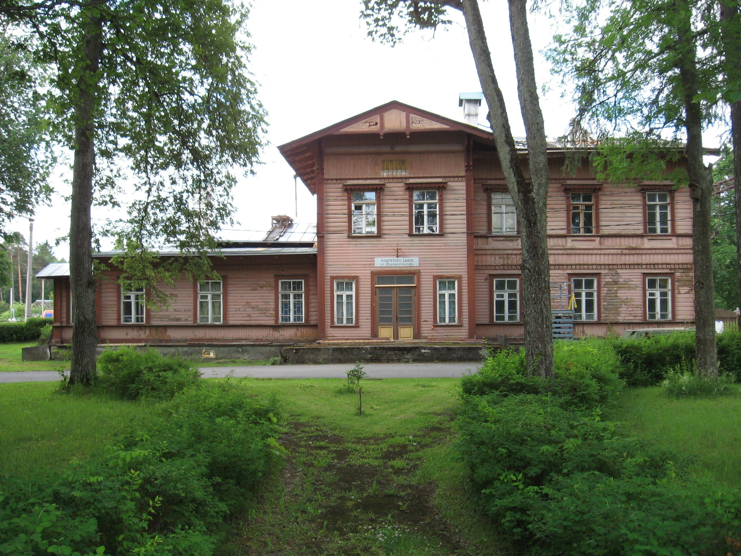 Aegviidu jaama peahoone